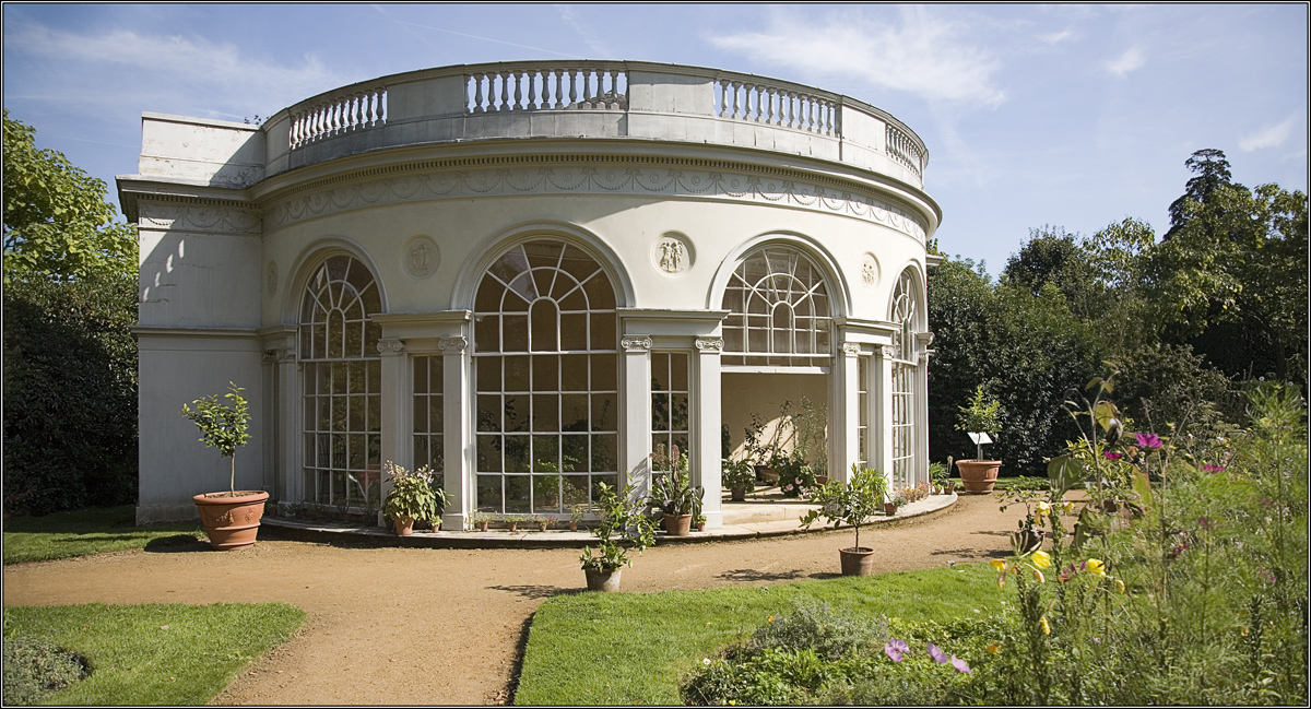 Osterley Park, Gardenhouse